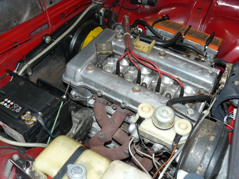 Reims 2012